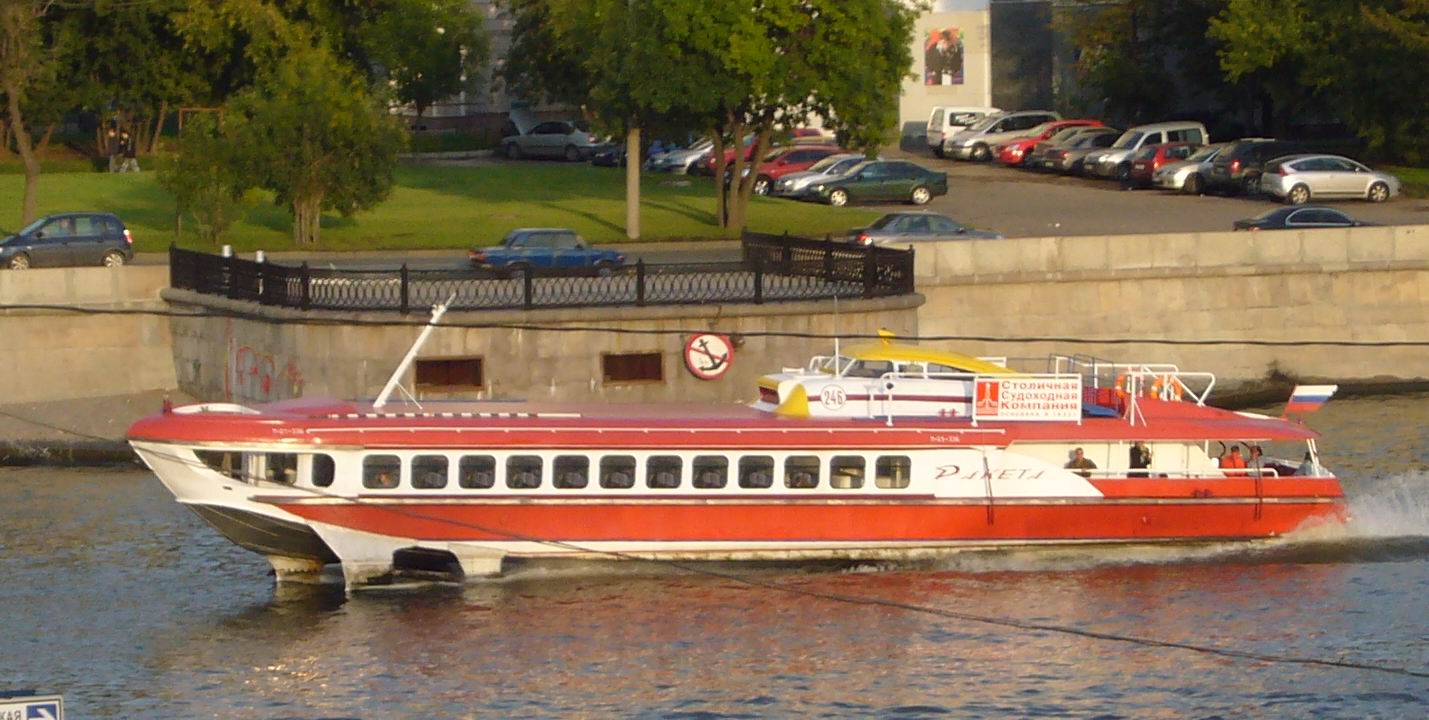 Racketa, Moscow, 2007